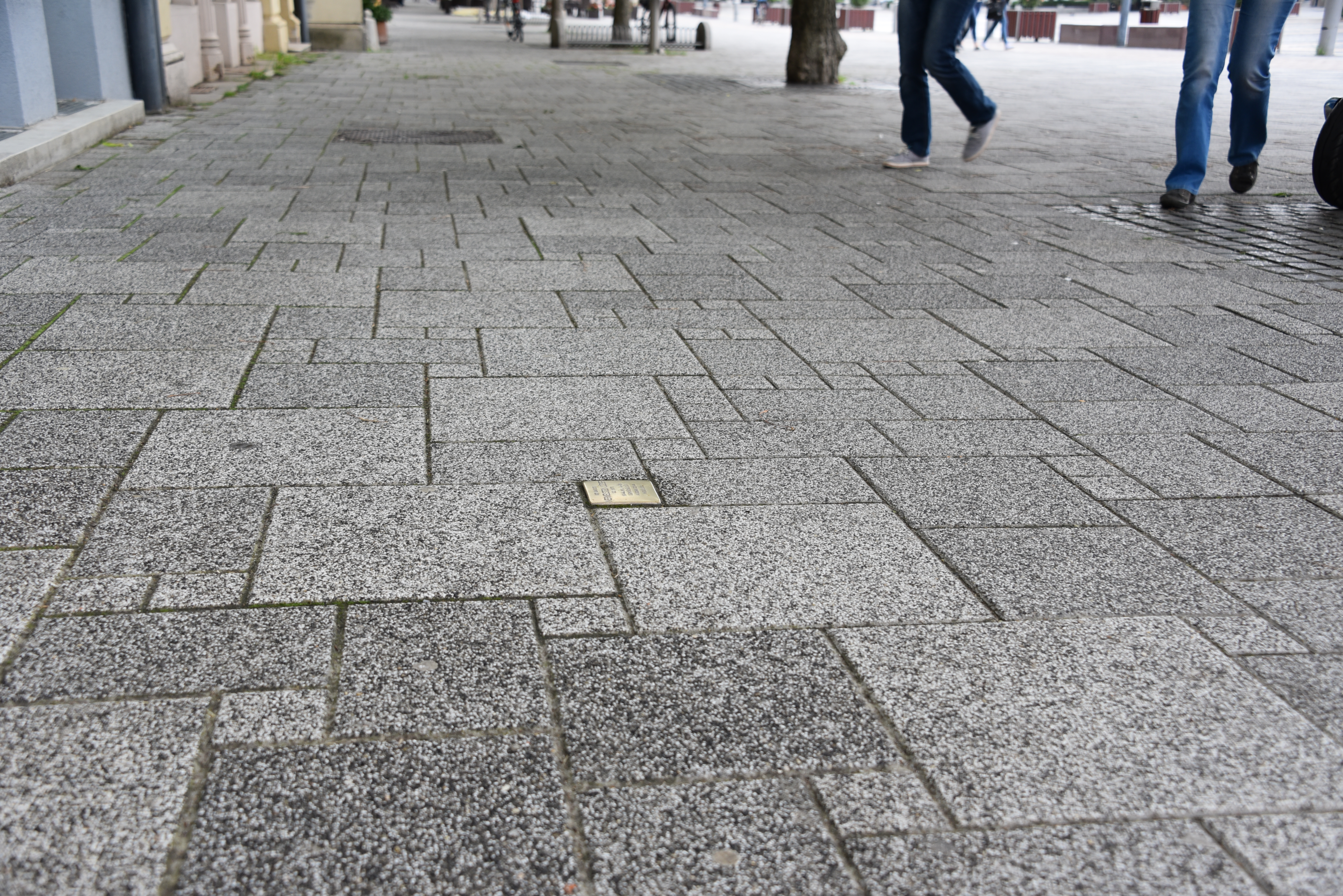 Stolperstein in Szombathely